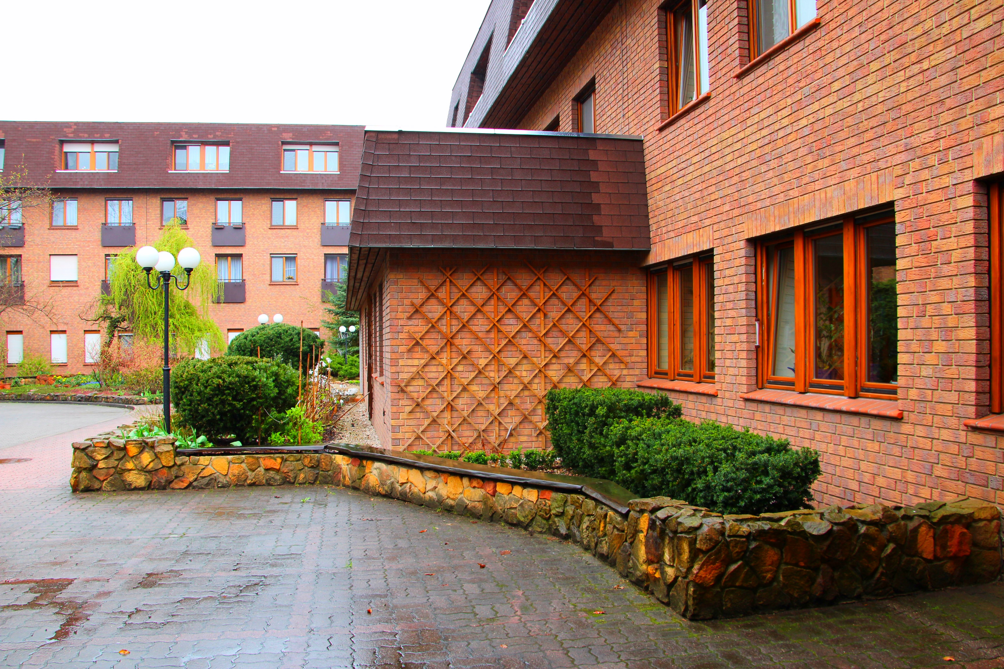 Nadarzyn pod Warszawą.